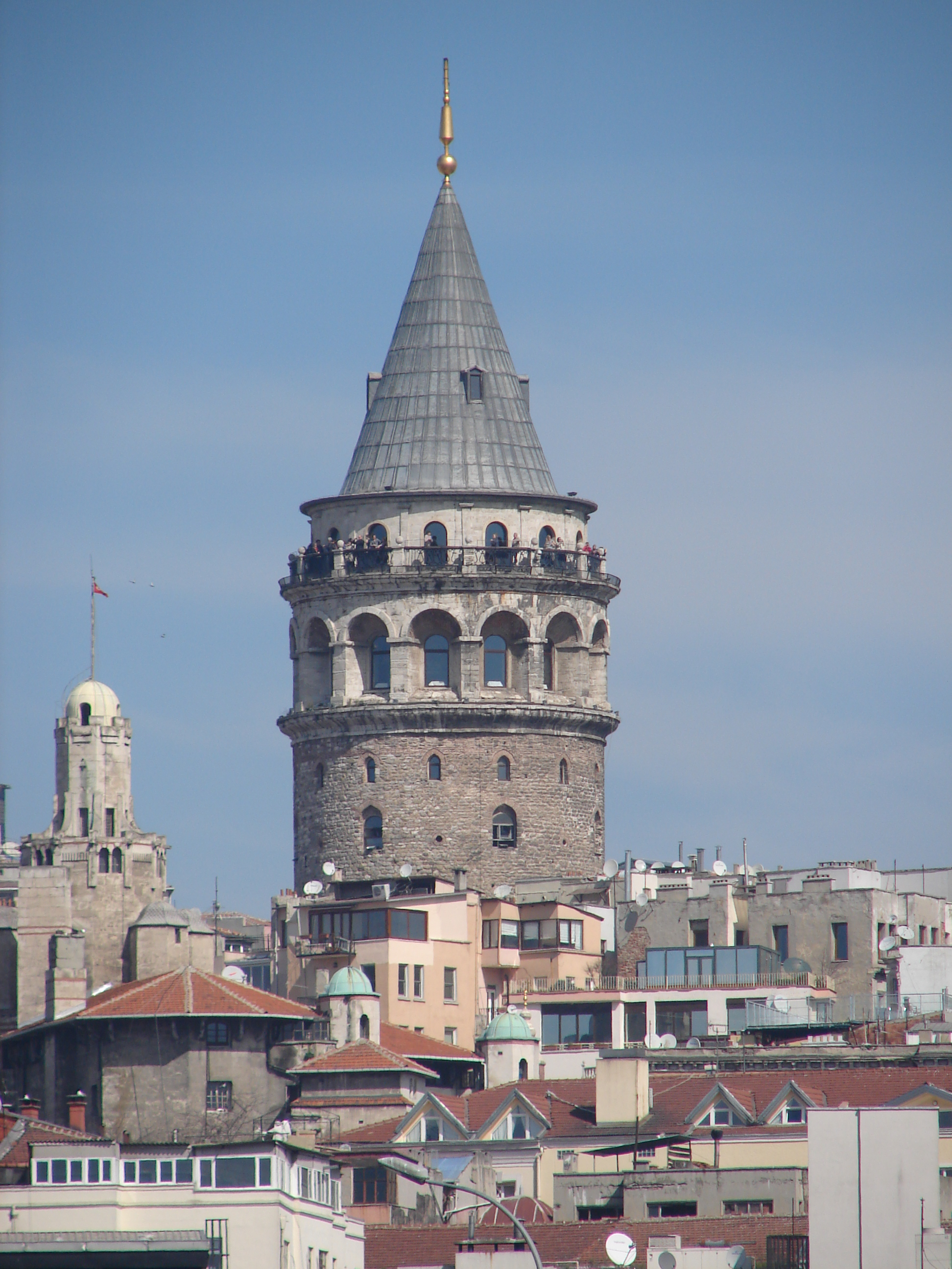 Galata Tower, Istanbul